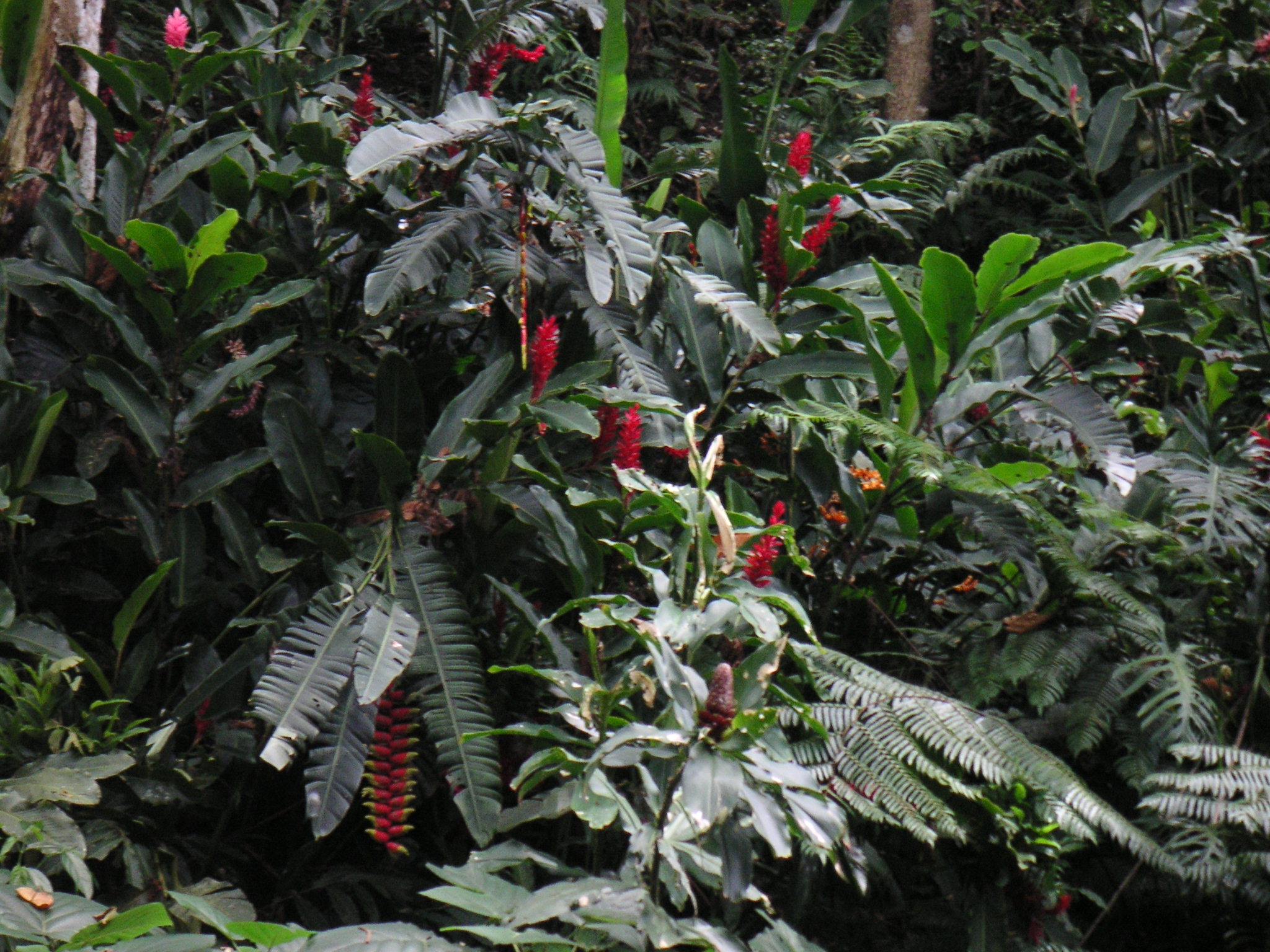 Der Fotografin unbekannte Pflanze, Parque del Café, Quindio / Kolumbien